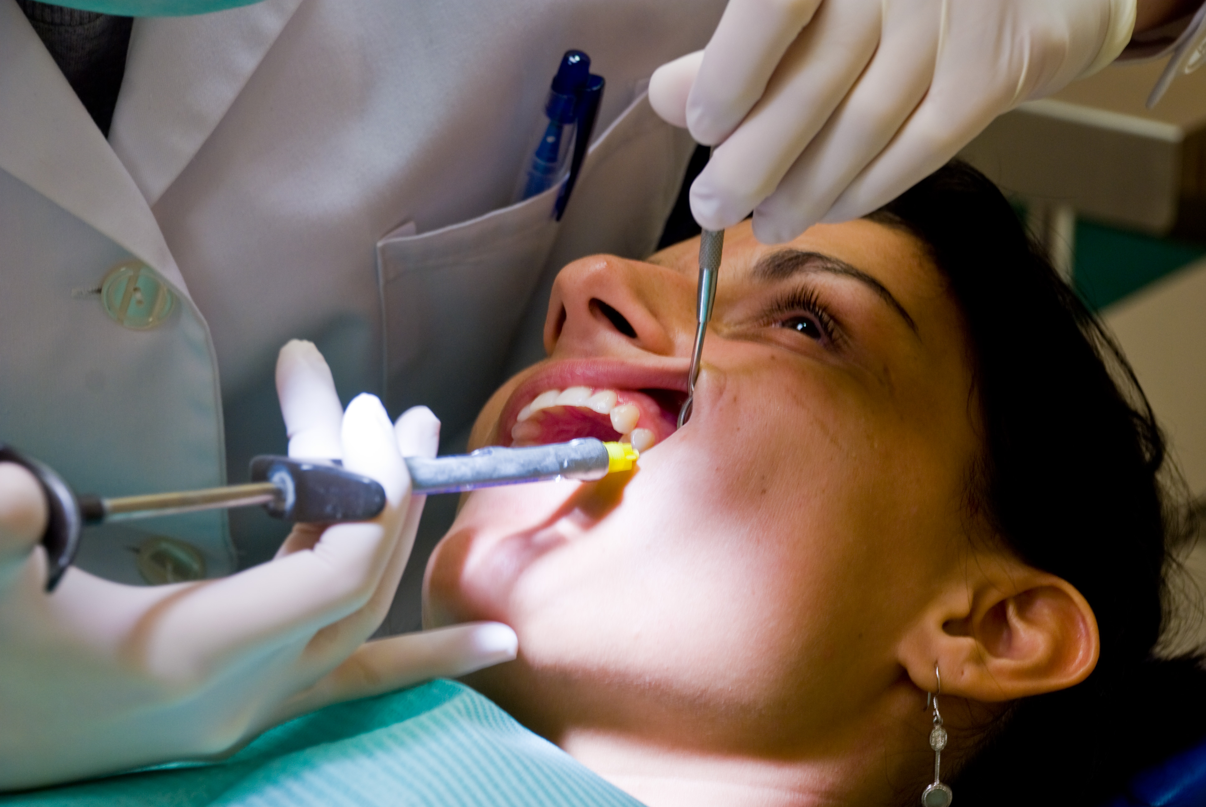 Un'odontoiatra sta iniettando un anestetico nella gengiva di una paziente